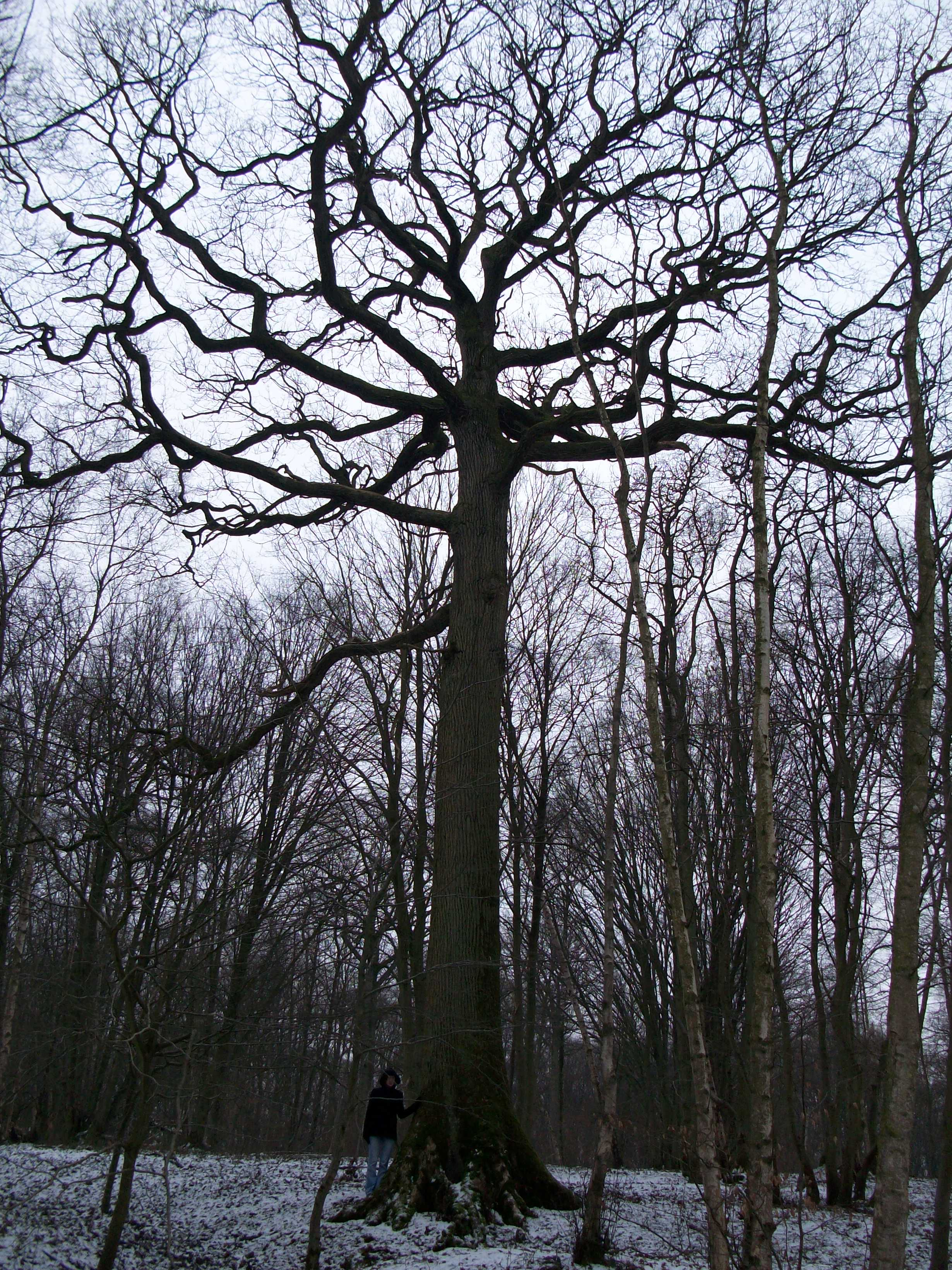 forme du houppier d'un chêne pédonculé photo prise dans le nord pas de calais France